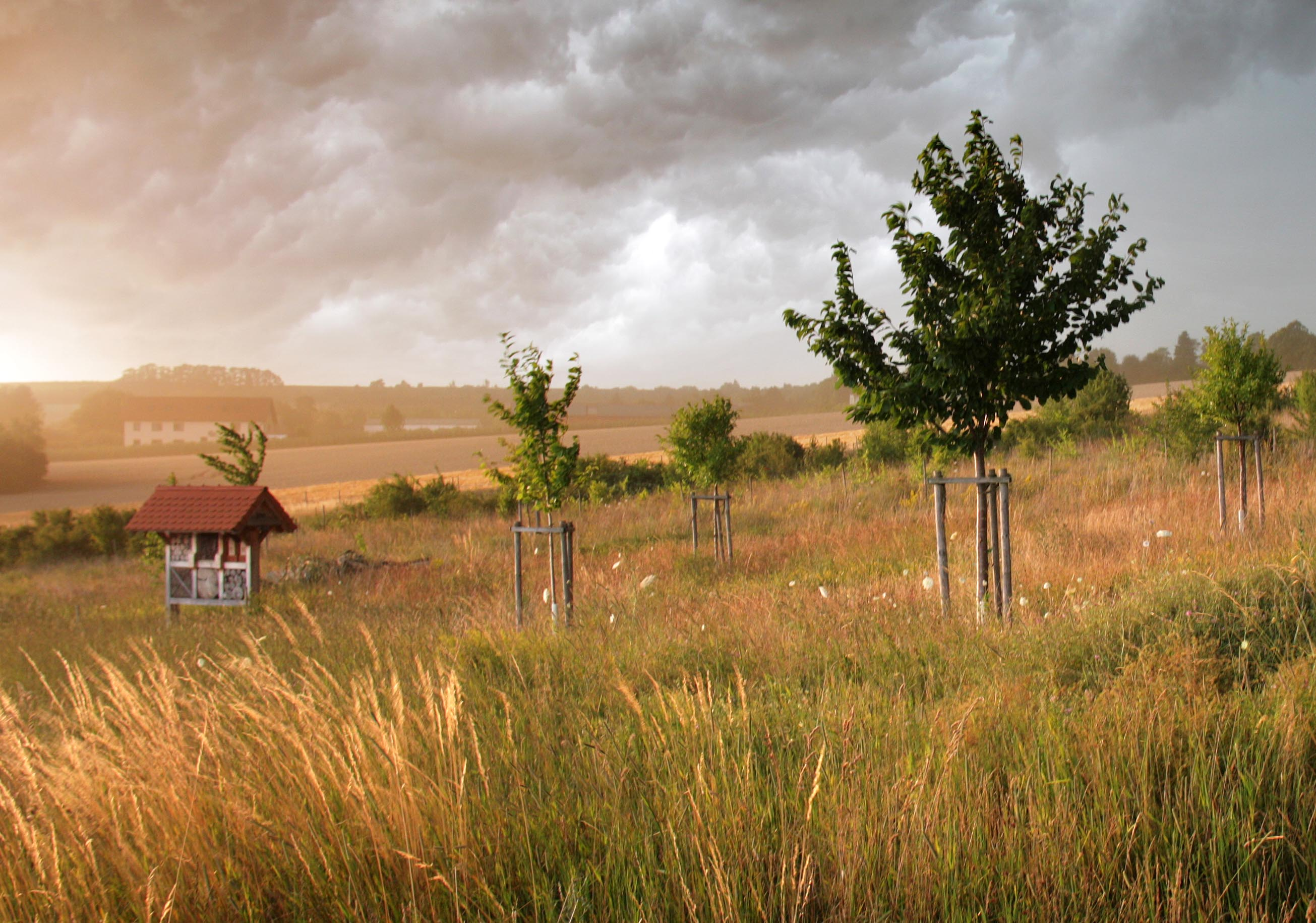 Ausgleichsfläche am Wingertsweg in Klein-Winternheim mit (links) dem Bienenhotel bei dramatischem Licht